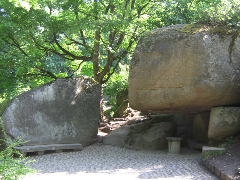 Грот Сциллы.